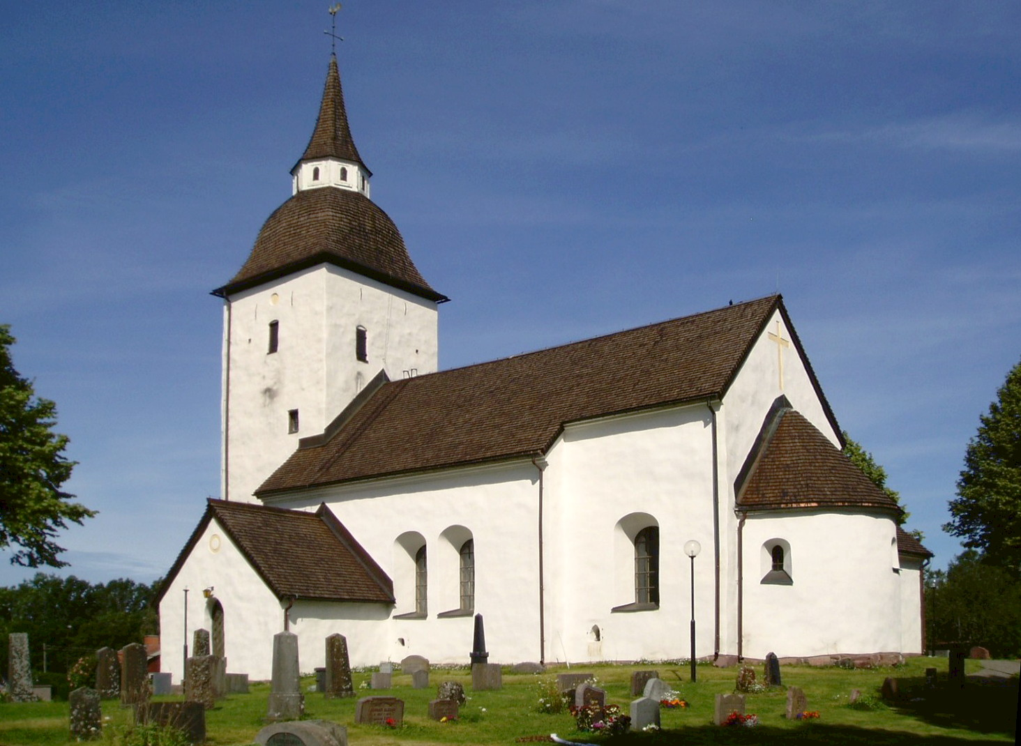 Ytterenhörna kyrka, Södermanland, Sverige